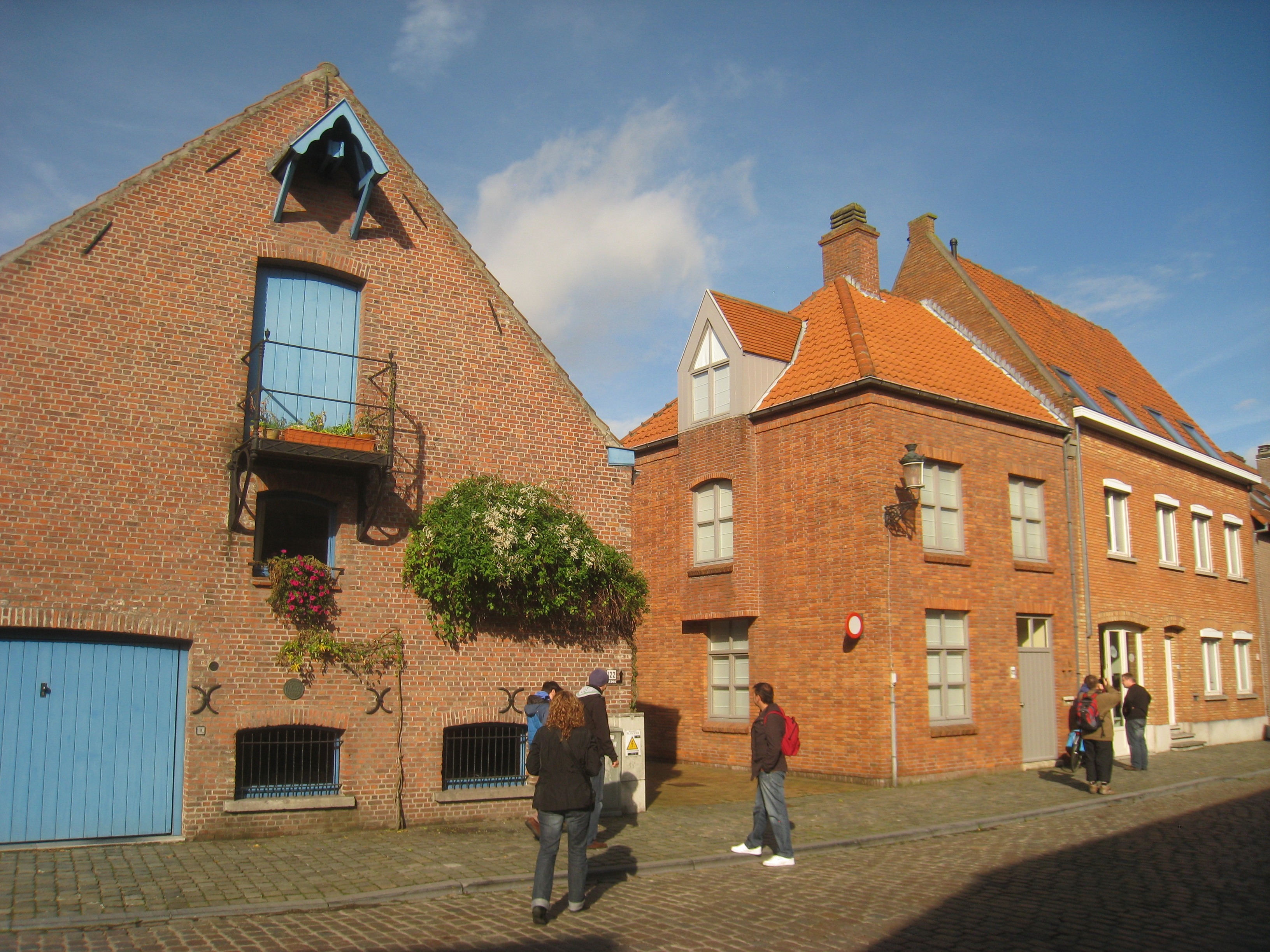 Buildings in Bruges (Brugge), Belgium.